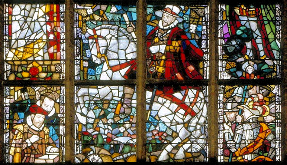 Nieuwe Kerk: Interieur, aanzicht glas-in-loodraam, detail raam nummer 2 (opmerking: Gefotografeerd voor Glas in lood in Nederland 1817-1968)